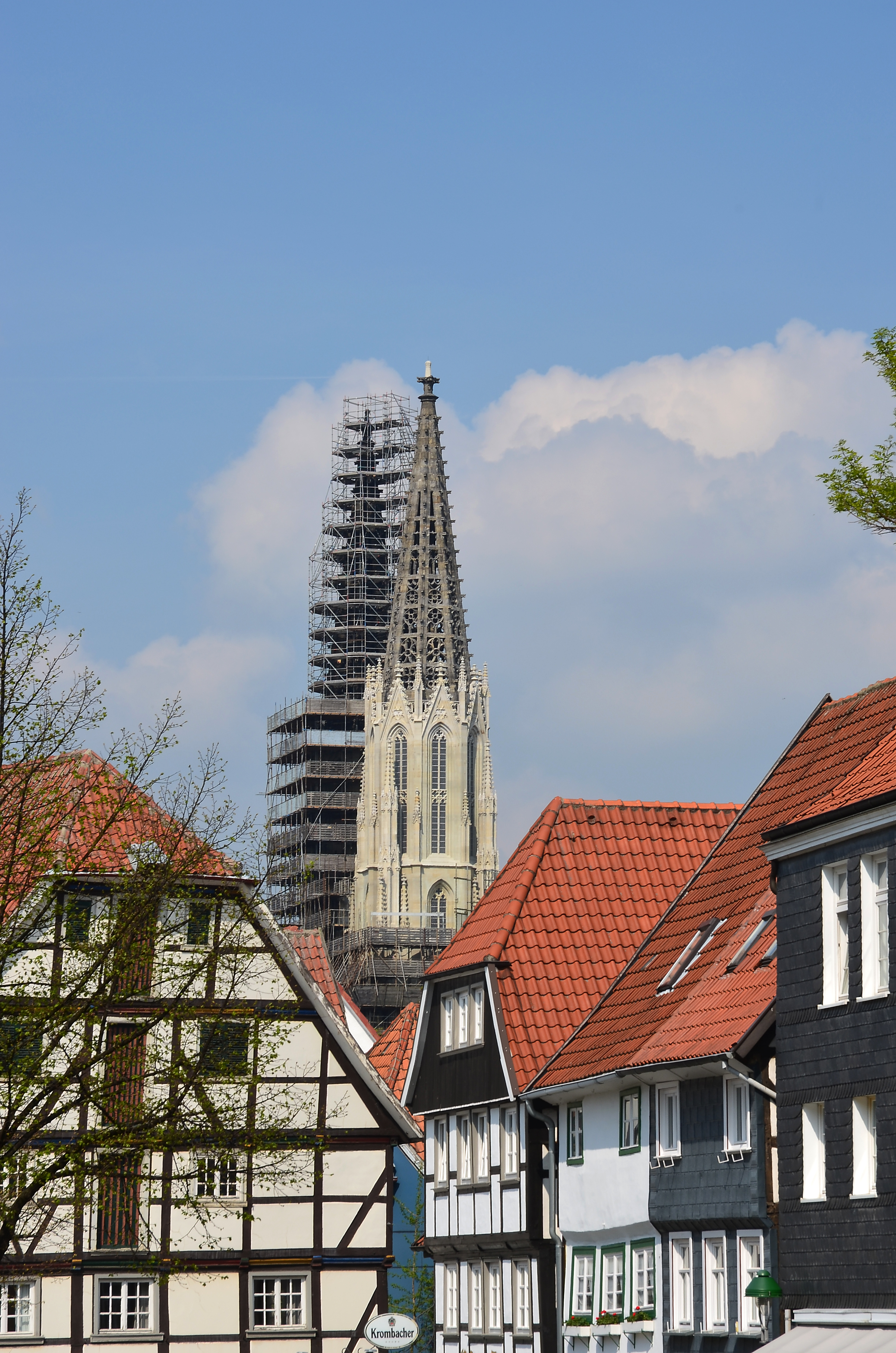 Türme Sankt Maria zur Wiese von Am Vreithof aus, Soest, Germany